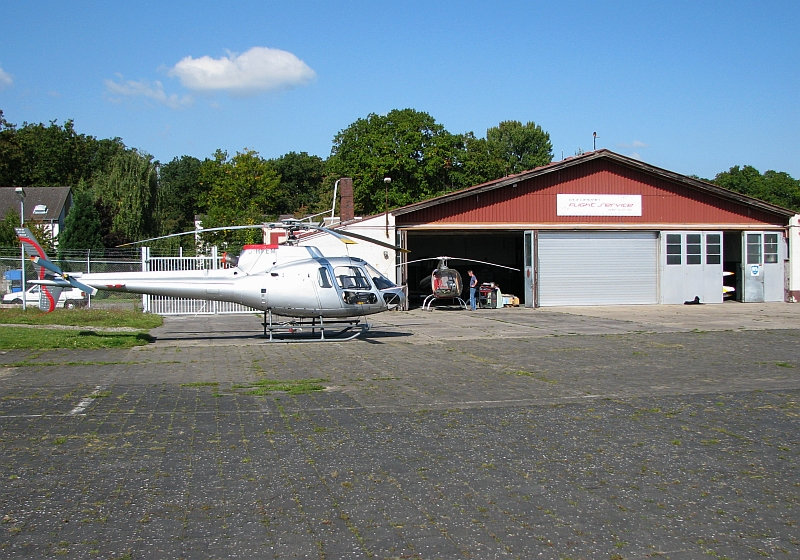 Flugplatz Mainz-Finthen Hubschrauber Helicopter Foto 2008 Wolfgang Pehlemann Wiesbaden